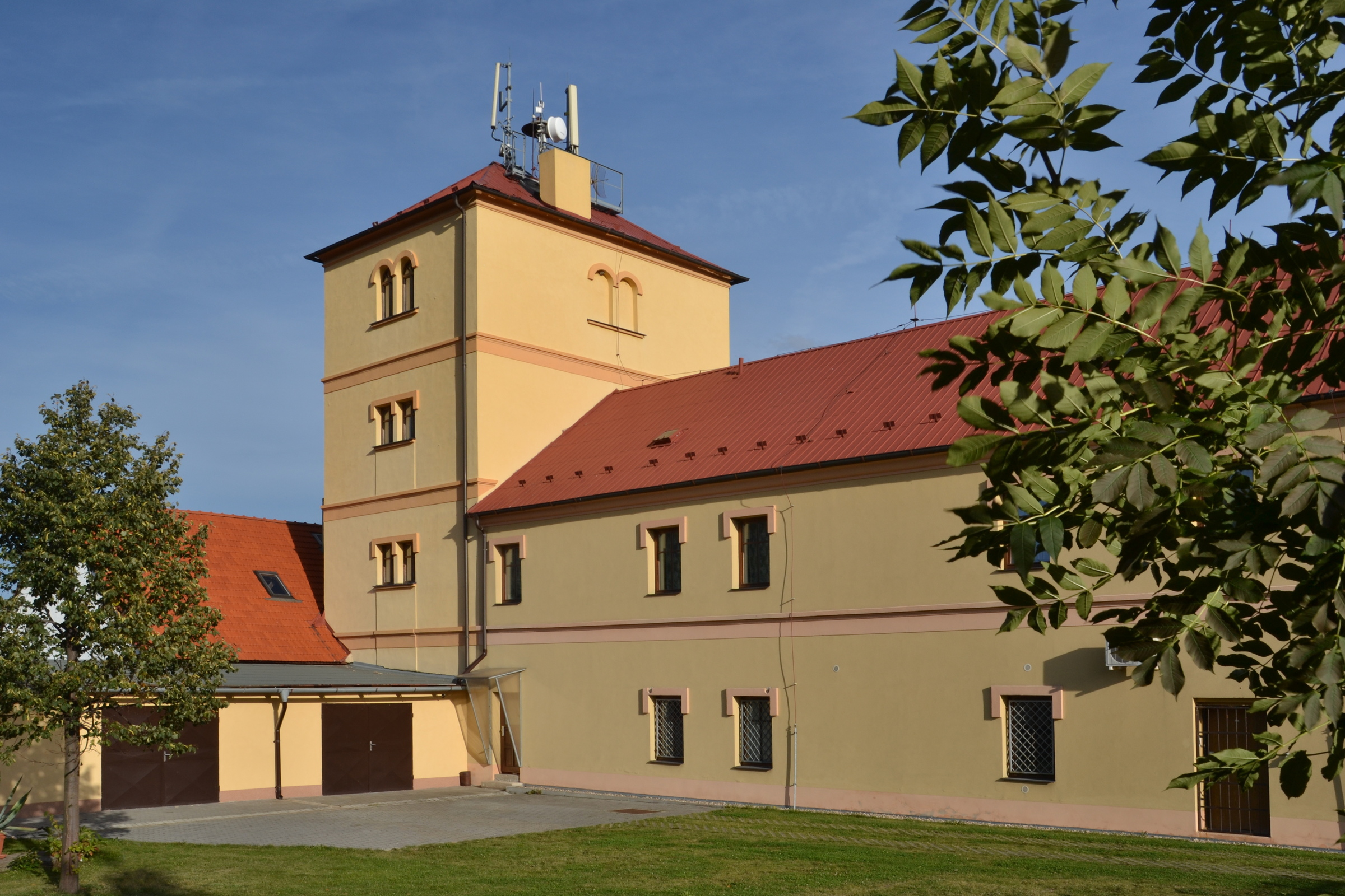 Rudný důl, z toho jen: těžní věž (Vysoká Pec), Vysoká Pec